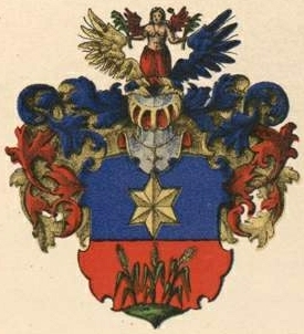 Engelhardti suguvõsa aadlivapp